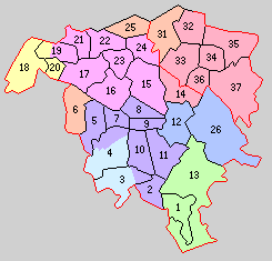 千葉県印旛郡の町村。